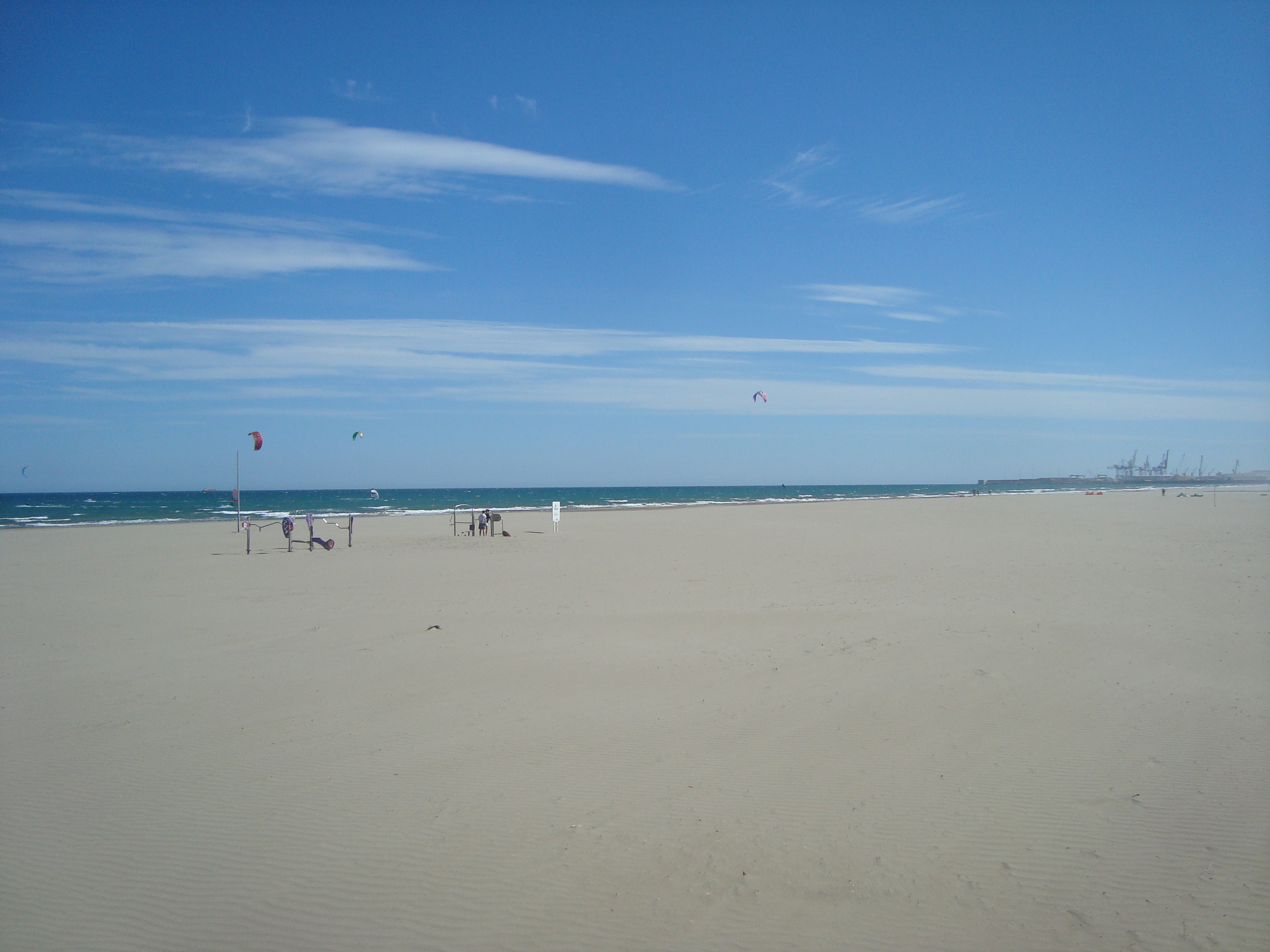 Platja del Gurugú (Castelló de la Plana)